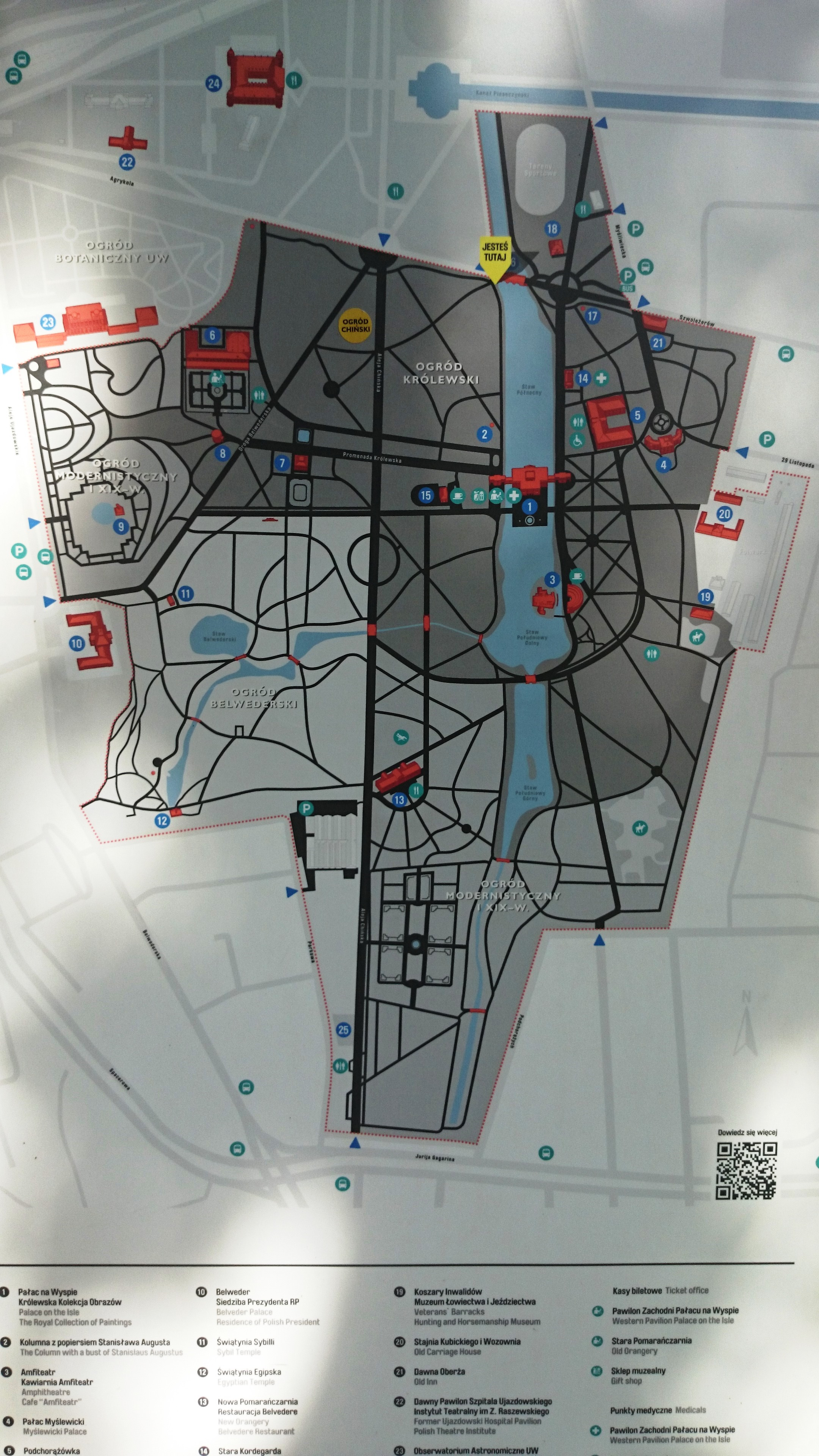 Plan Parku Łazienkowskiego z zaznaczonym (zółtym kółkiem) położeniem Ogrodu Chińskiego